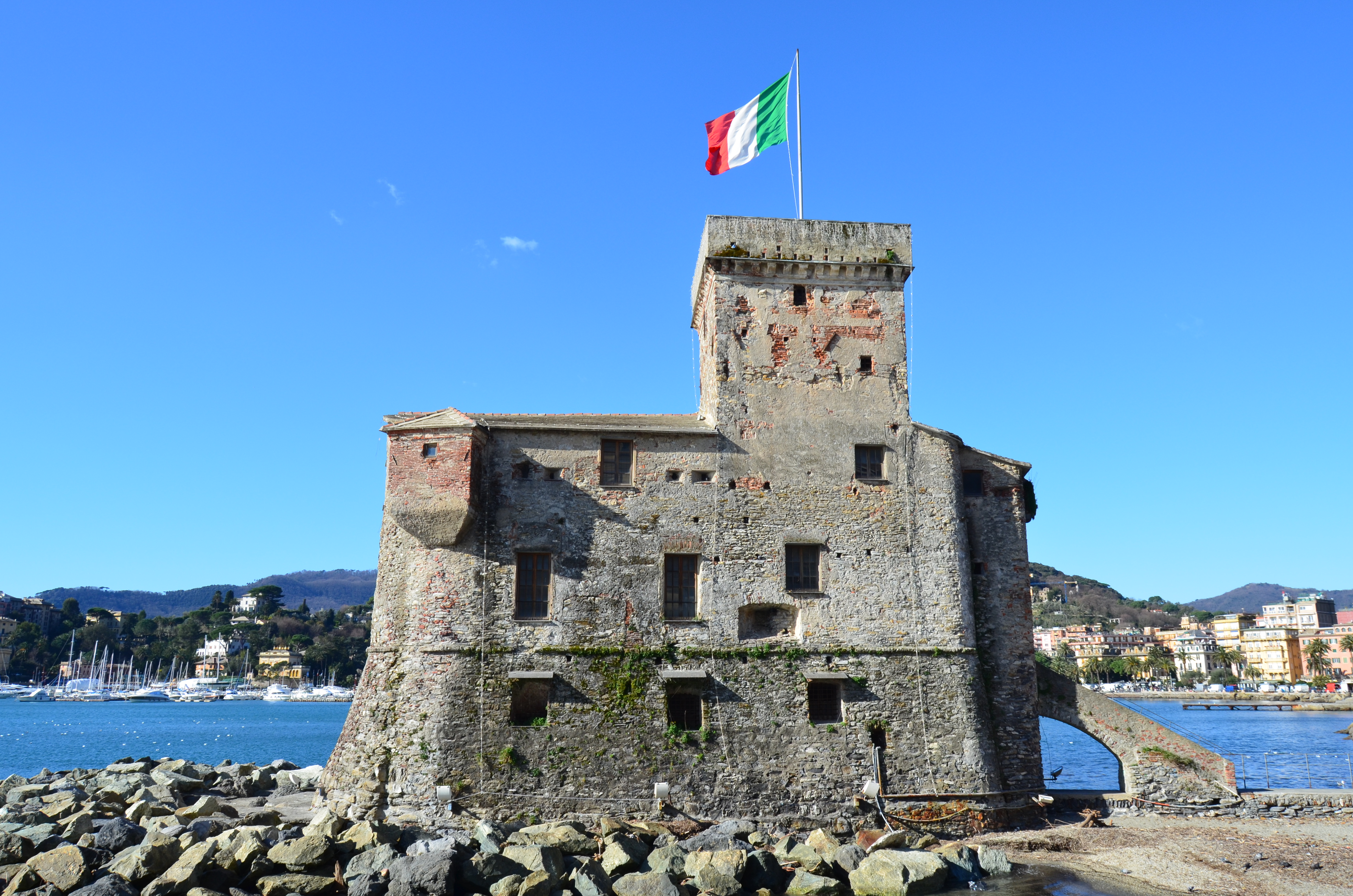 Il castello sul mare di Rapallo, Liguria, Italia